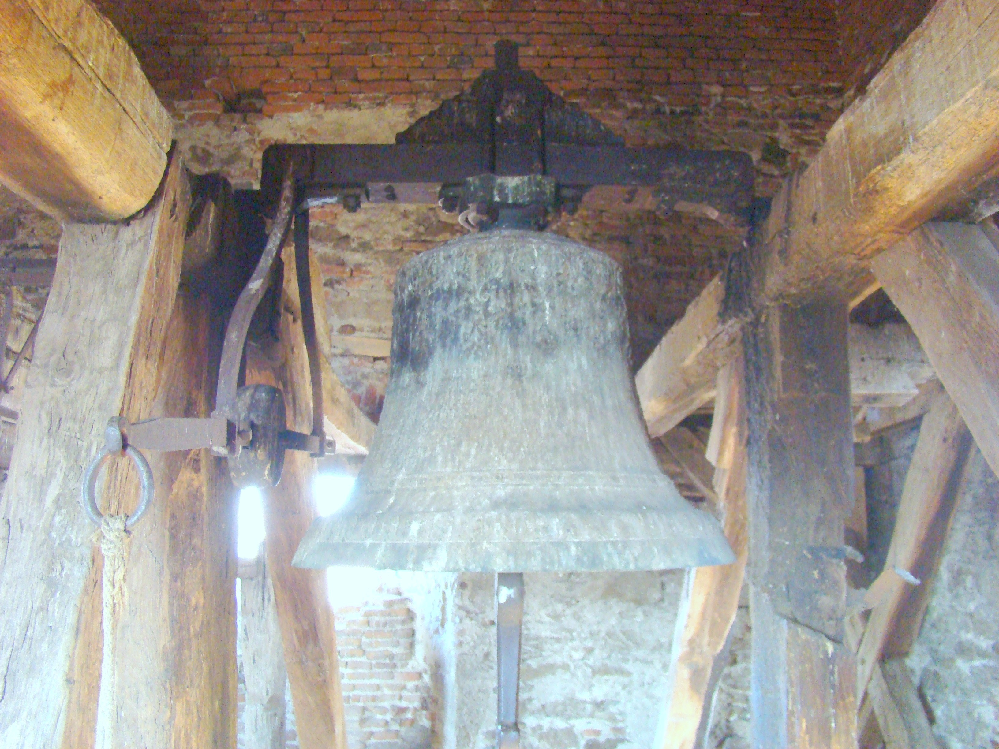 Biserica evanghelică fortificată din Nou, județul Sibiu